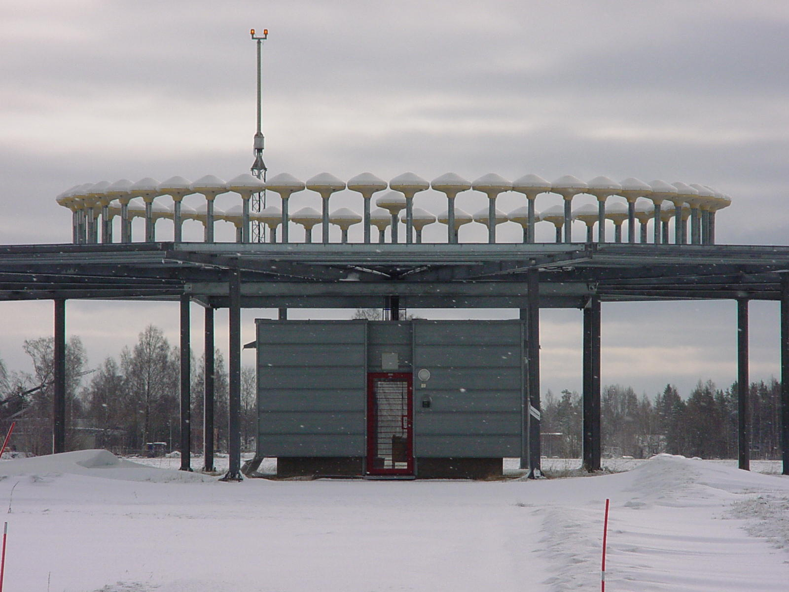 ILS bend kriterier